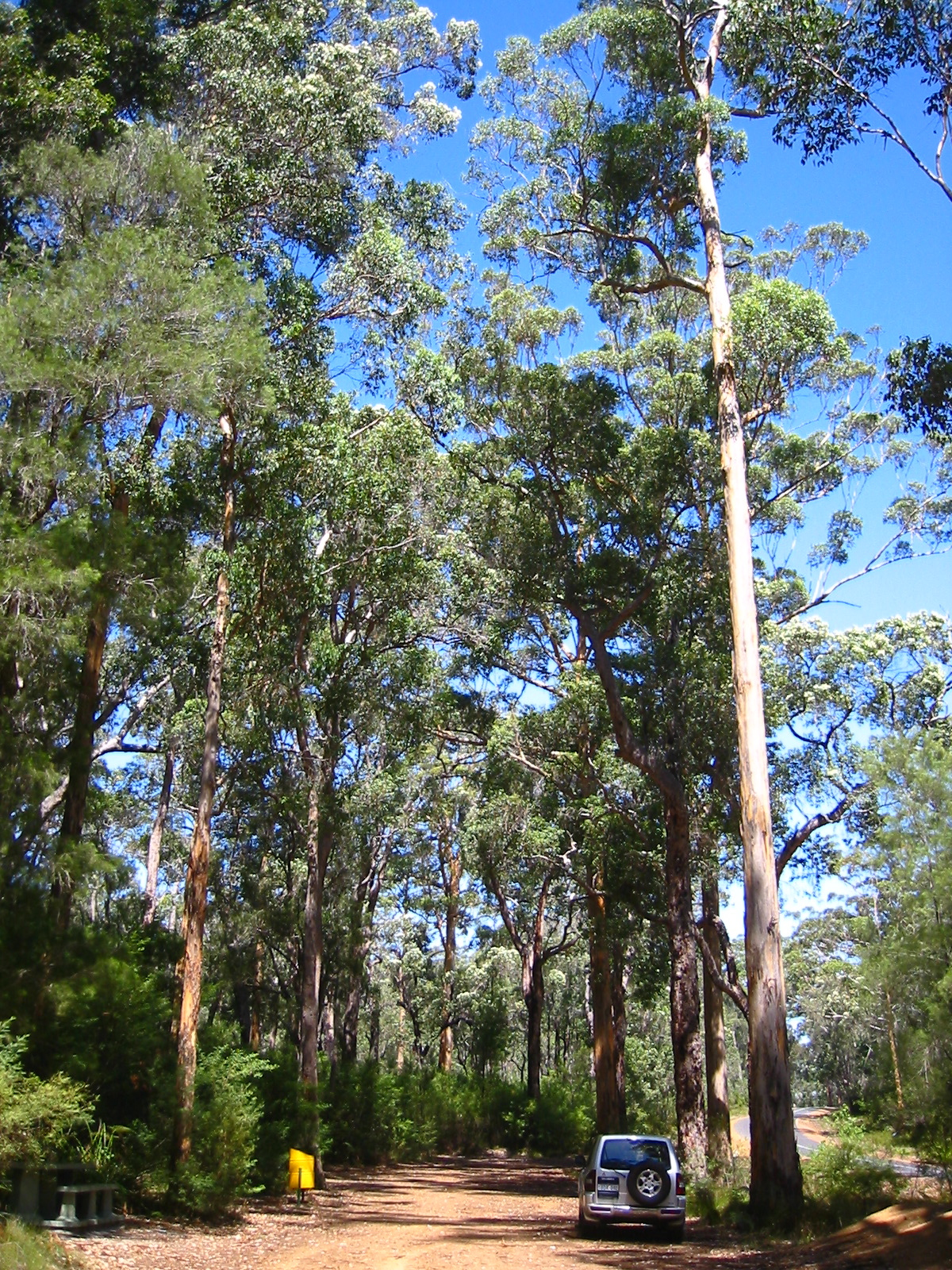 auf dem Weg durch den Südwesten von Western Australia